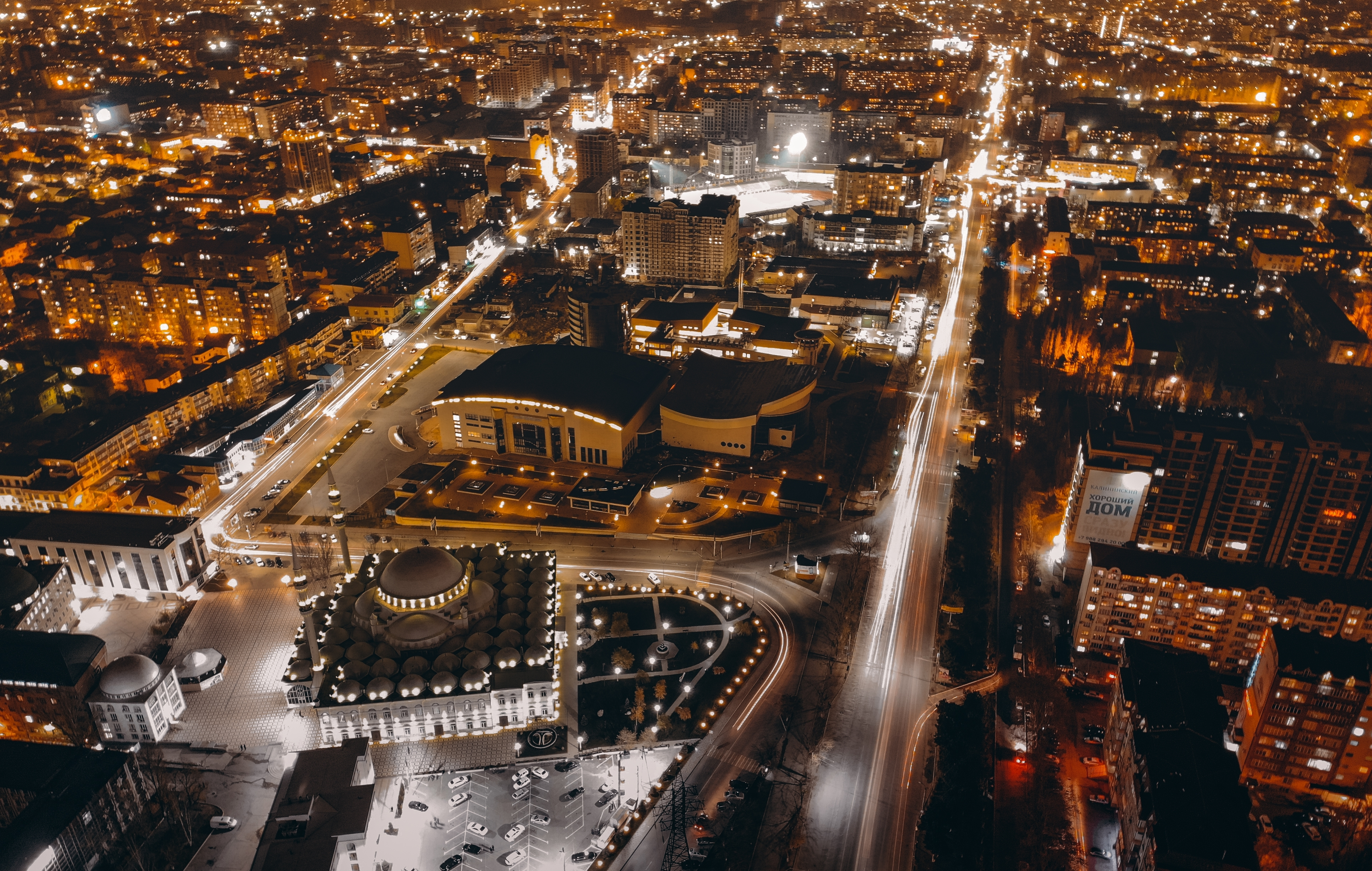 Вид на центр города